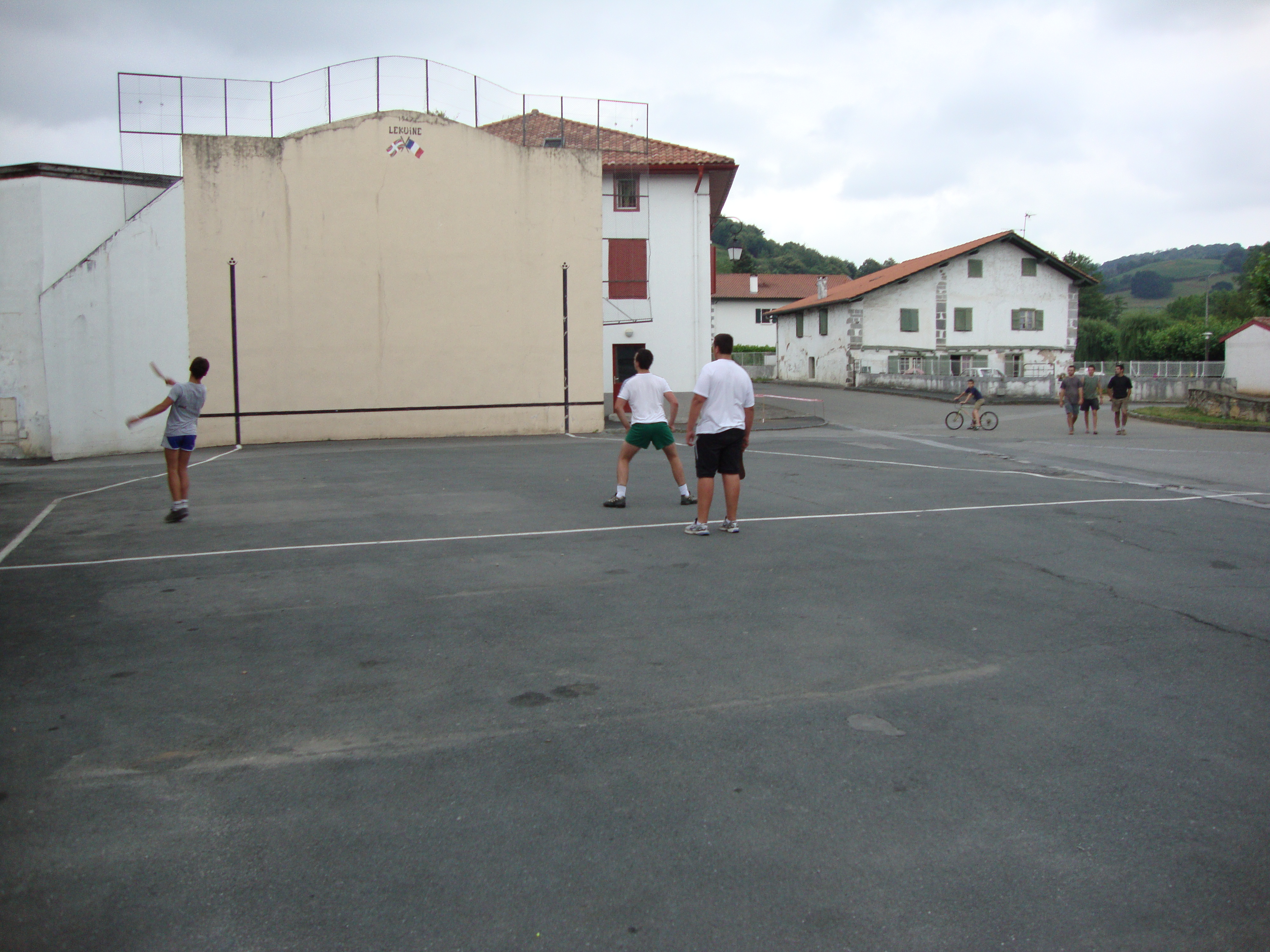 Bonloc (Pyr-Atl, Fr) Fronton avec joueurs de pelota pala 2 contre 2